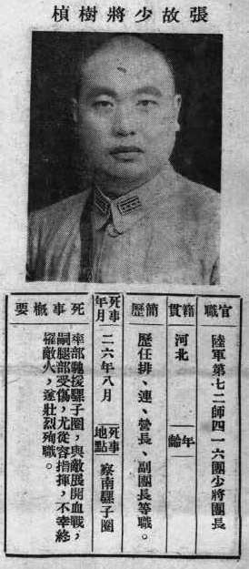 中文（台灣）: 抗戰軍人忠烈錄第一輯中的烈士遺像